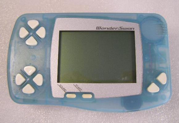 バンダイ、ワンダースワン